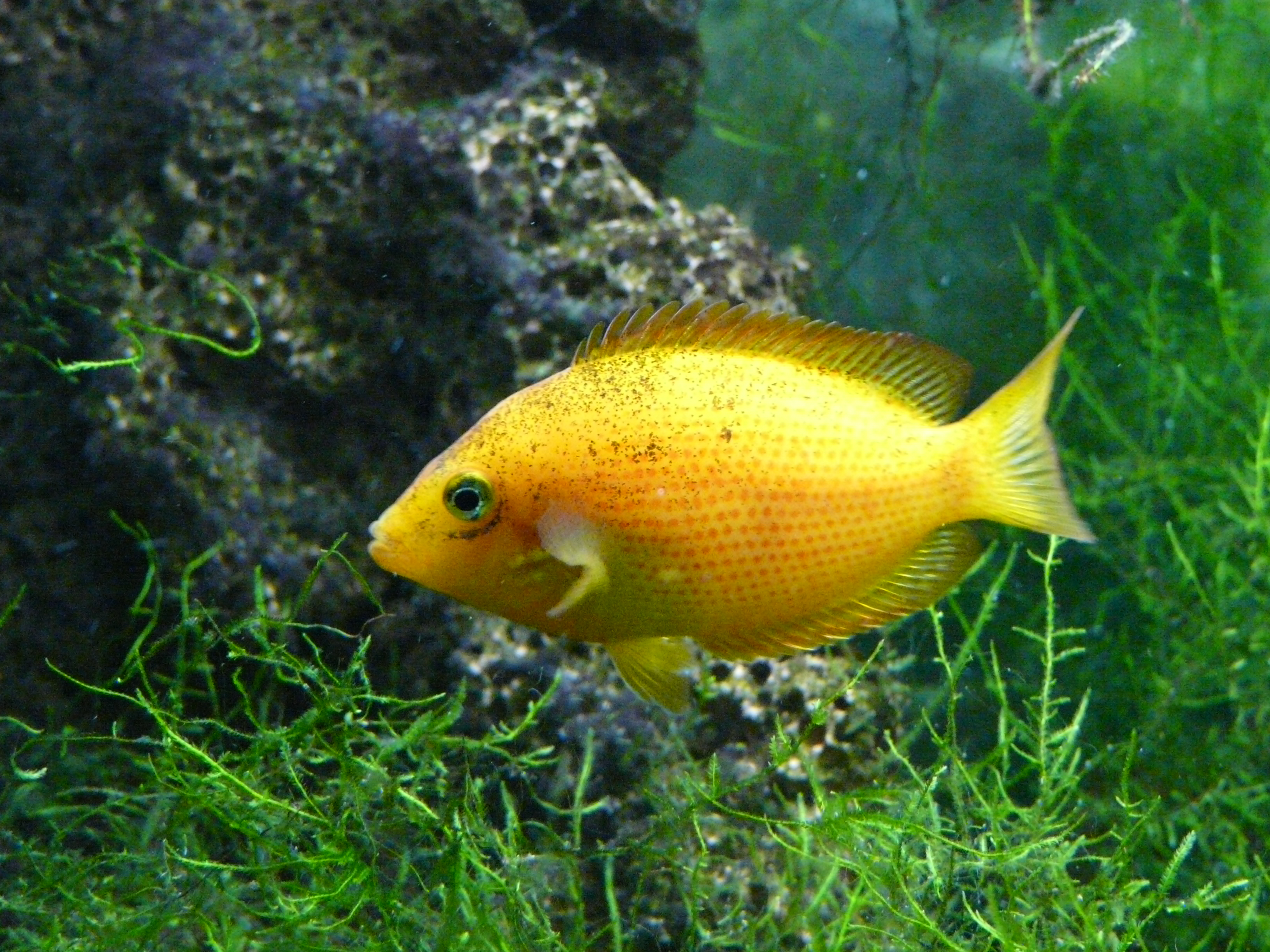 Cichlidé des Indes (Etroplus maculatus), aquarium tropical de Pierrefitte-Nestalas, Hautes-Pyrénées, France.